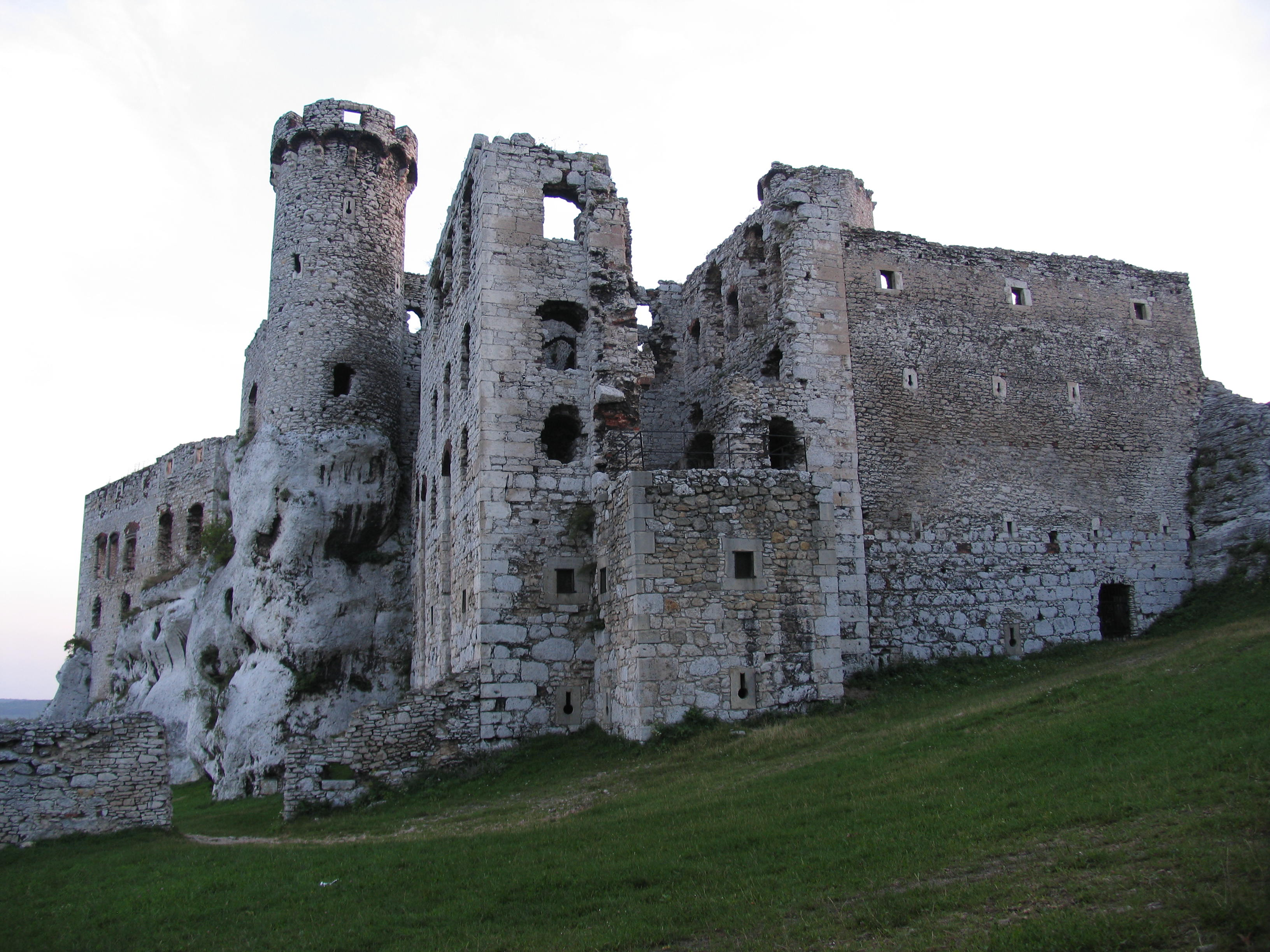 Ogrodzieniec, ruina zamku Bonerów, XIV, XVI